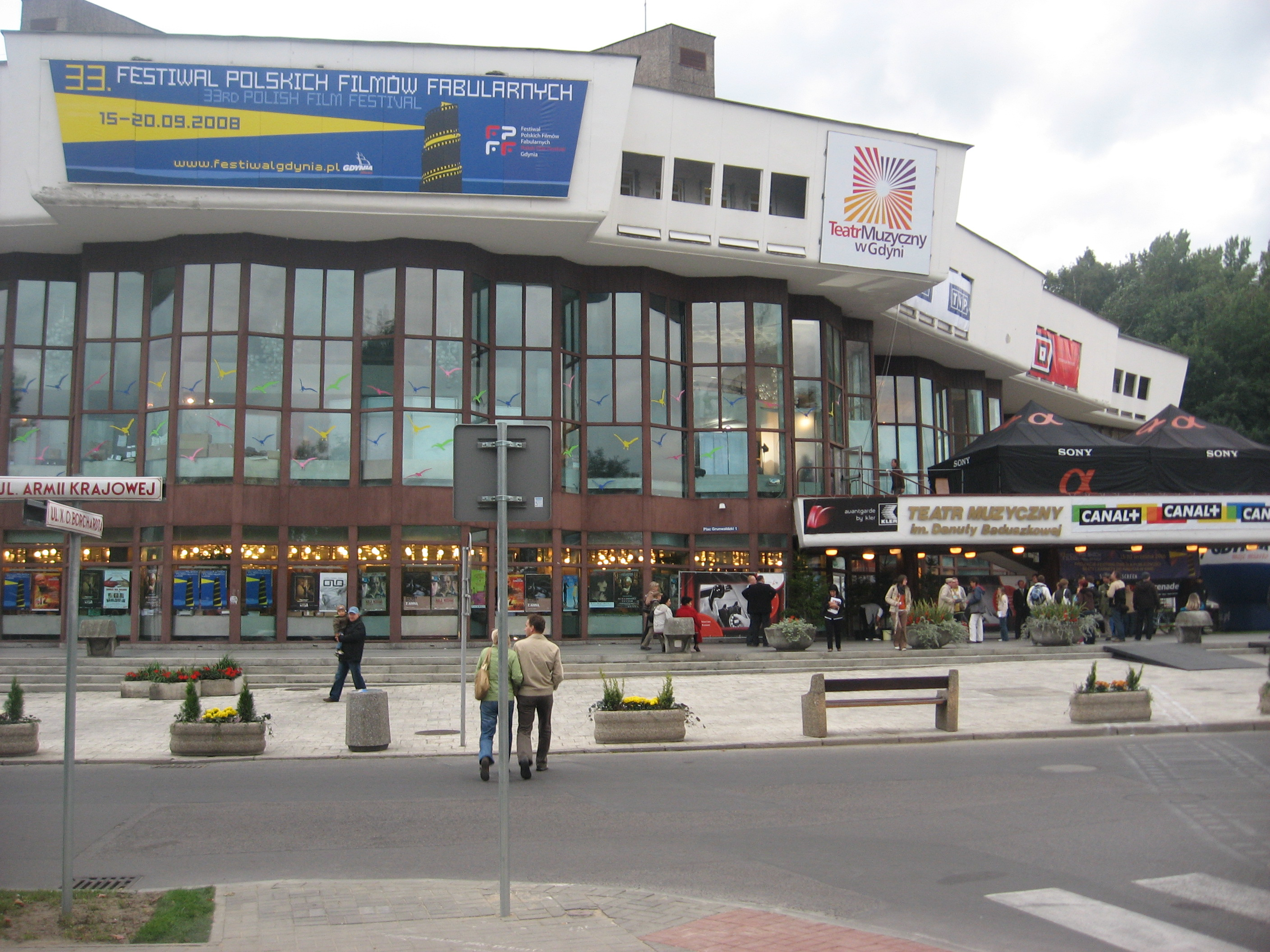 XXXIII Festiwal Polskich Filmów Fabularnych w Gdyni, Teatr Muzyczny - główna scena festiwalu.